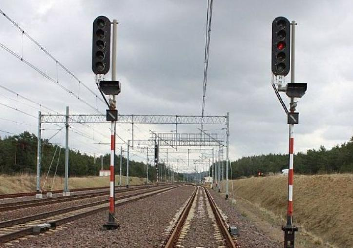 Fragment jednej z Polskich magistrali kolejowych